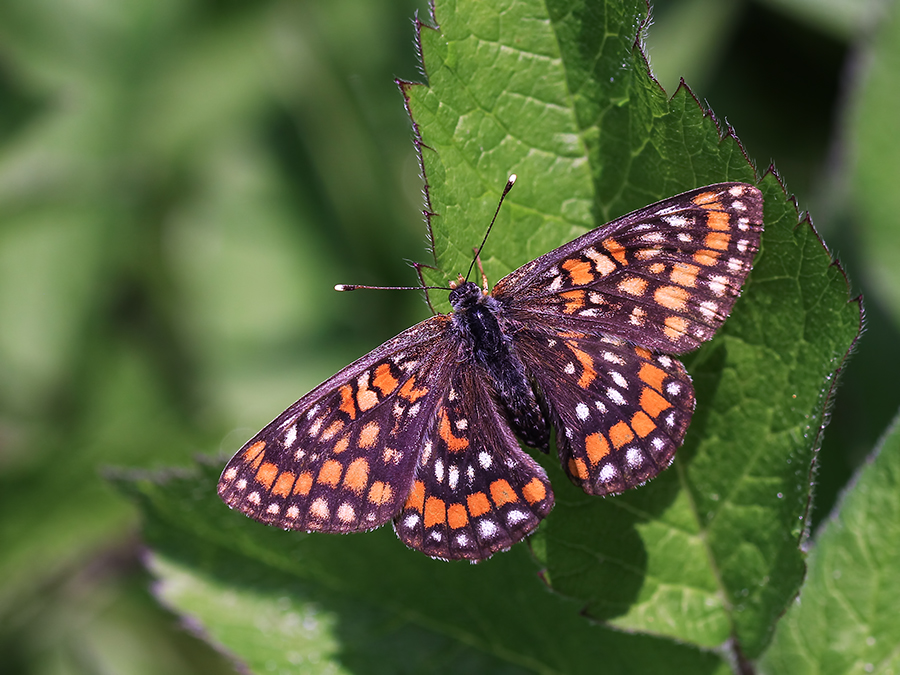 Euphydryas maturna, male - Bukk Hills, Hungary, 28/05/2016